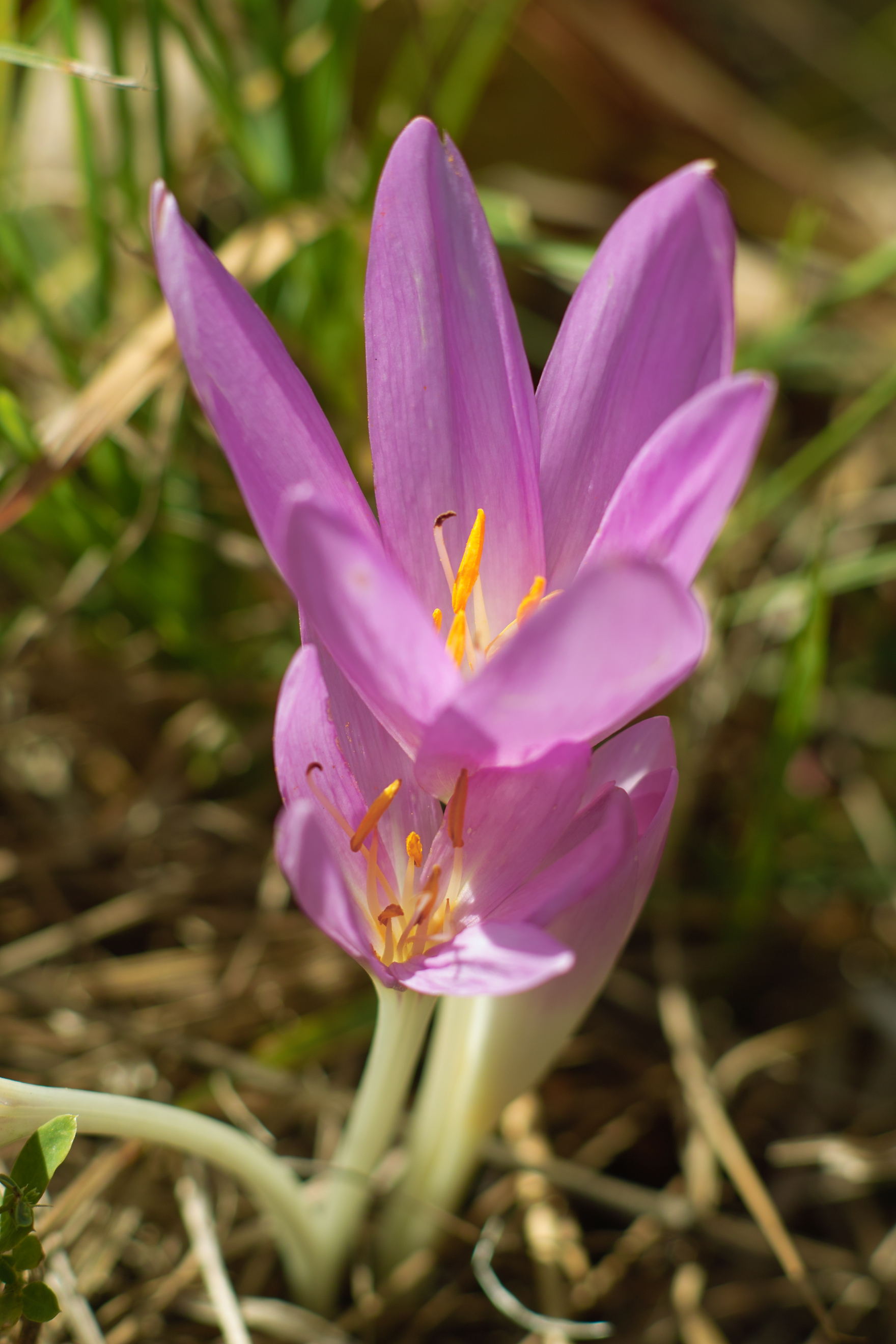 Vrbenské rybníky, ocún jesenní (Colchicum autumnale)